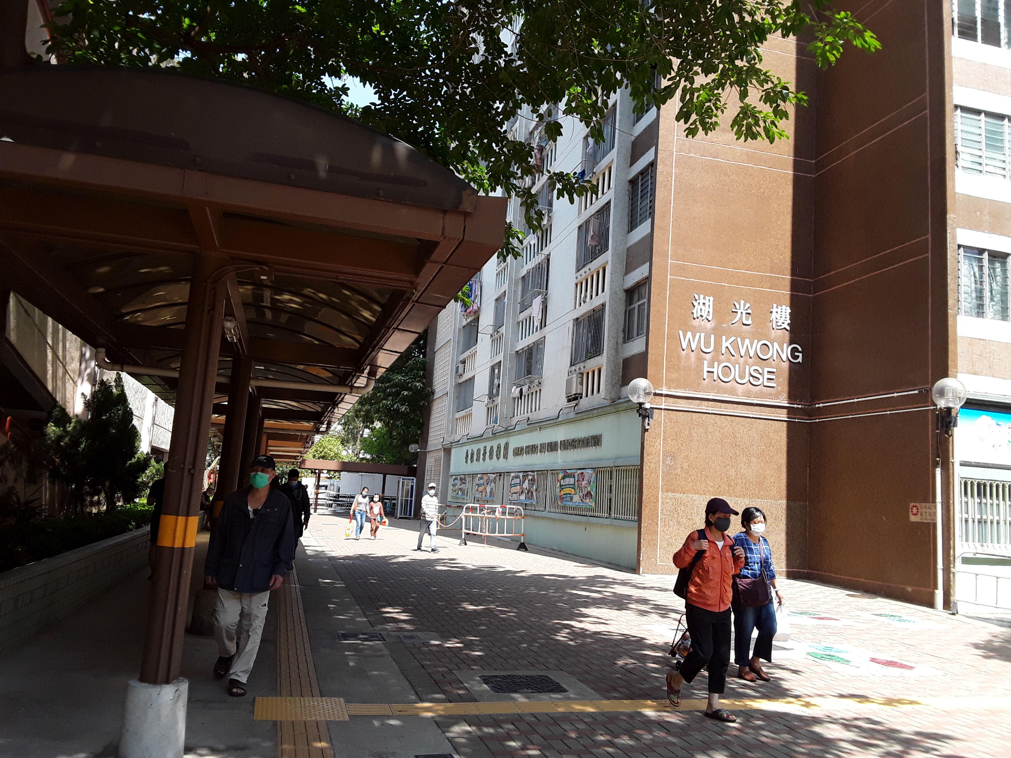 湖景邨湖光樓與對出的有蓋行人通道